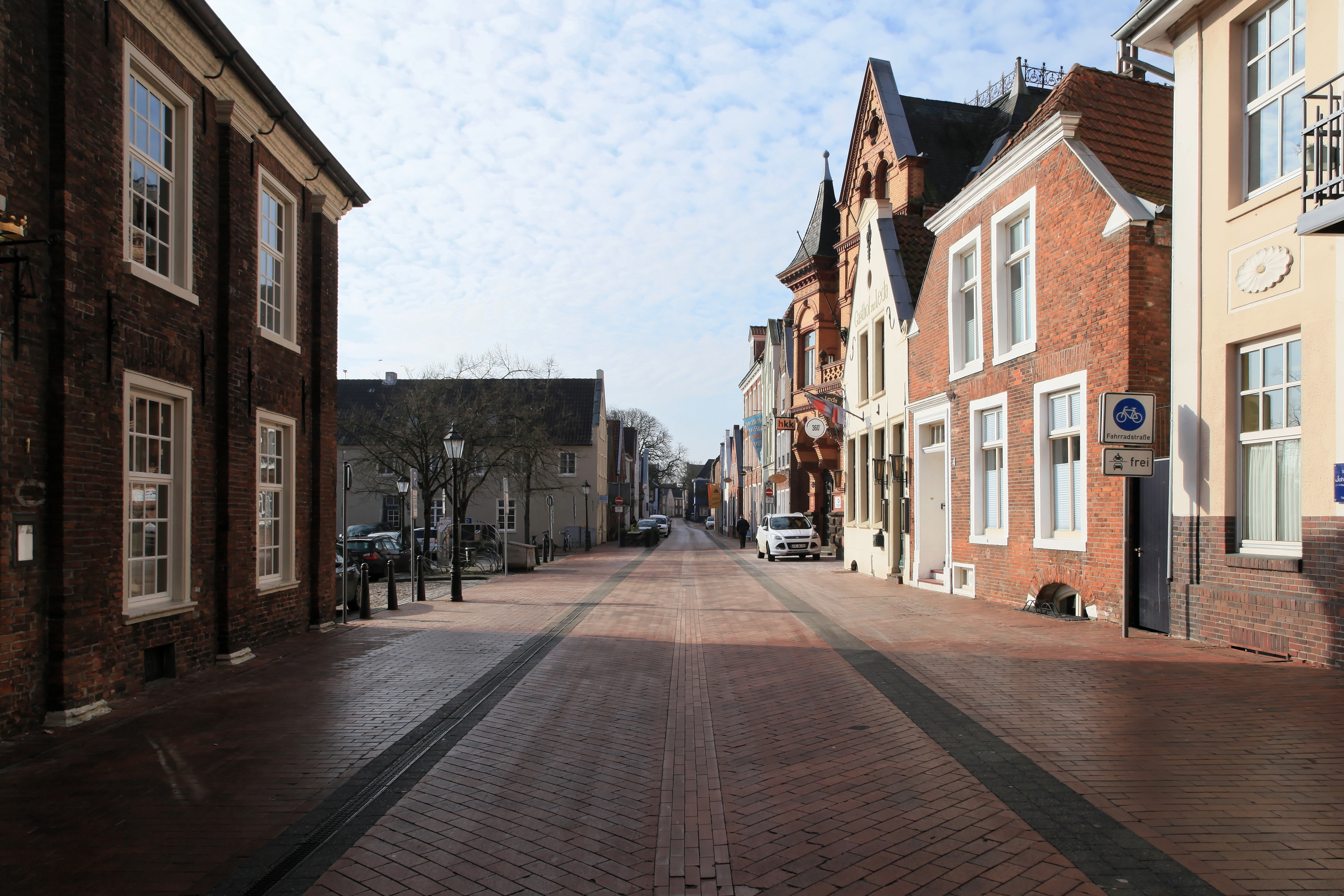 Neue Straße zwischen Haus Nr. 4 und Alter Waage in Leer (Ostfriesland)